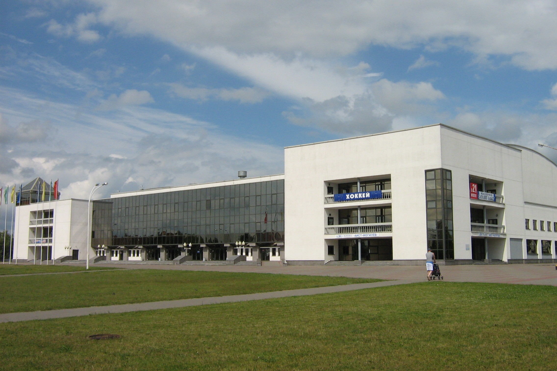 Могилев. Ледовый дворец.